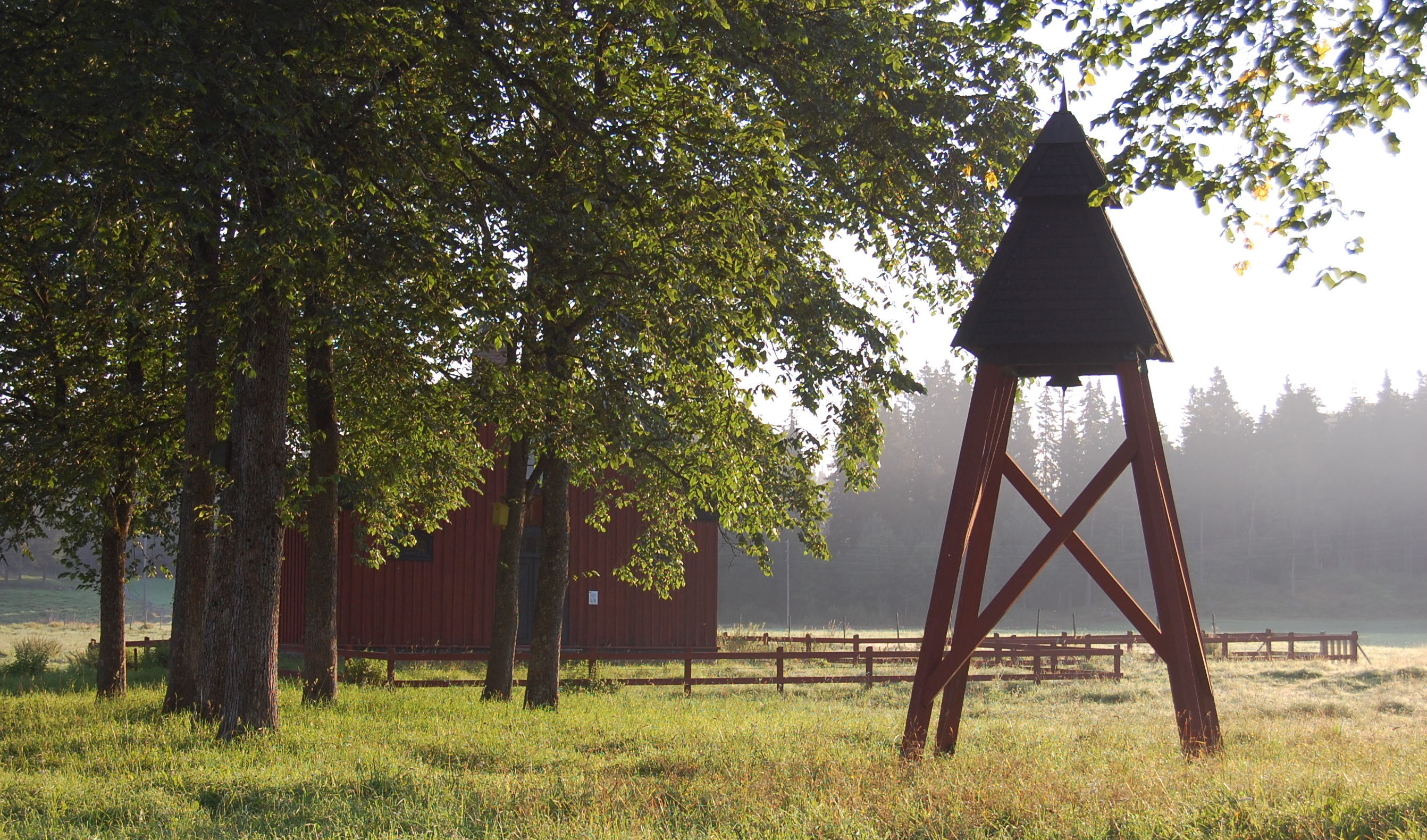 Häktet, Komstad, Sävsjö kommun